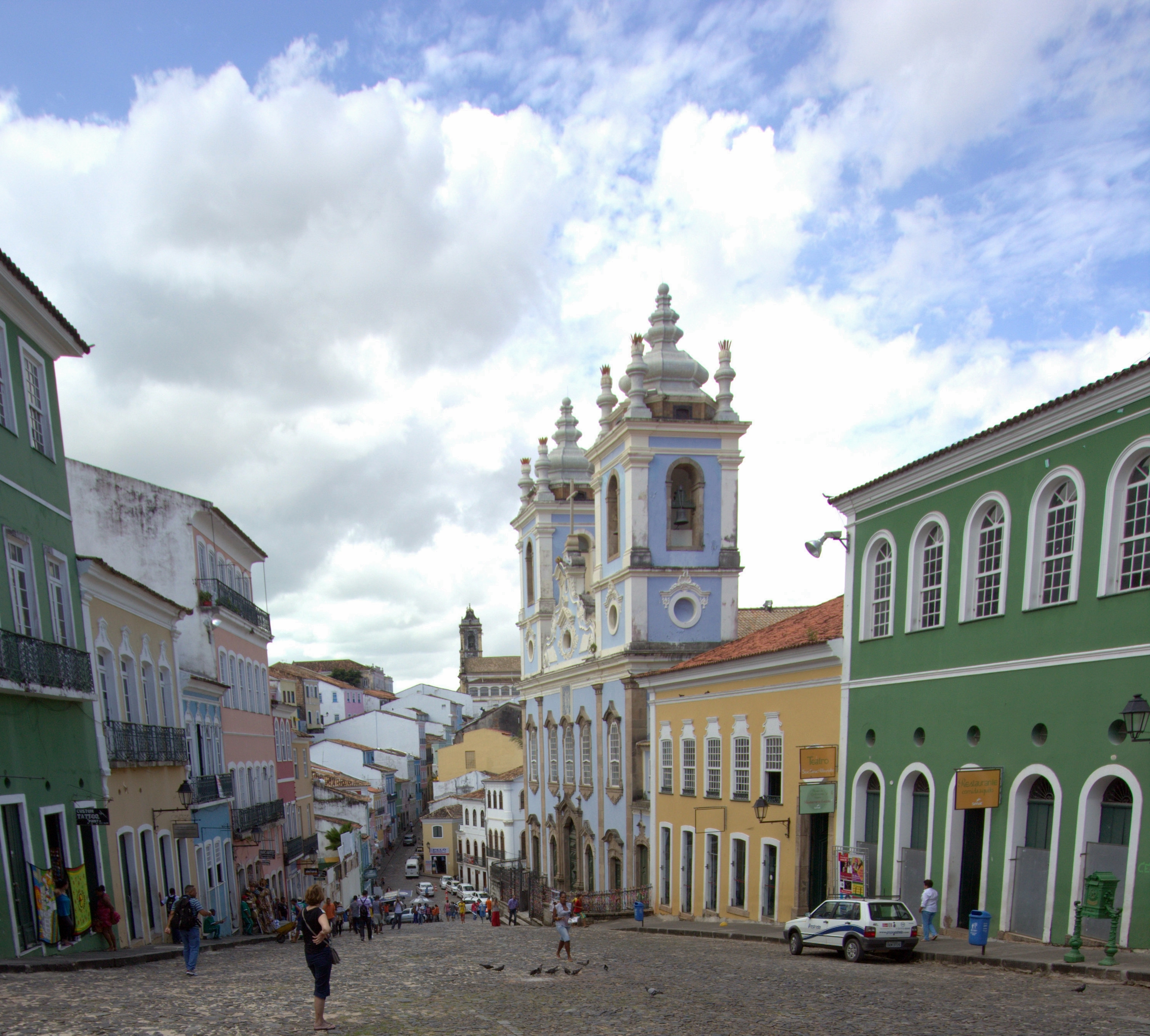 Largo do Pelourinho, Salvador, Bahia, Brasil.